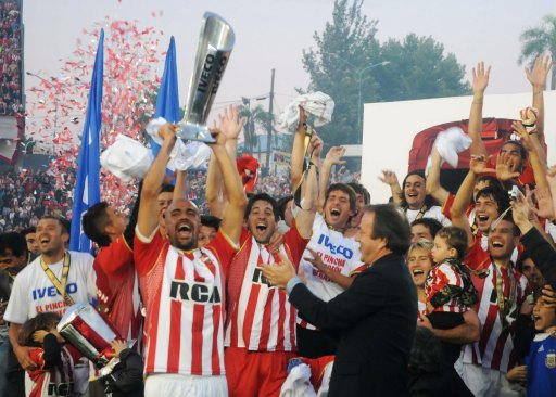 El capitán de Estudiantes de La Plata, Juan Sebastián Verón, levantando el trofeo de campeón del Torneo Apertura 2010 del fútbol argentino, durante la ceremonia de premiación.